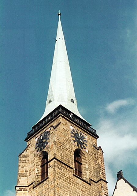 Foceno v srpnu 2000